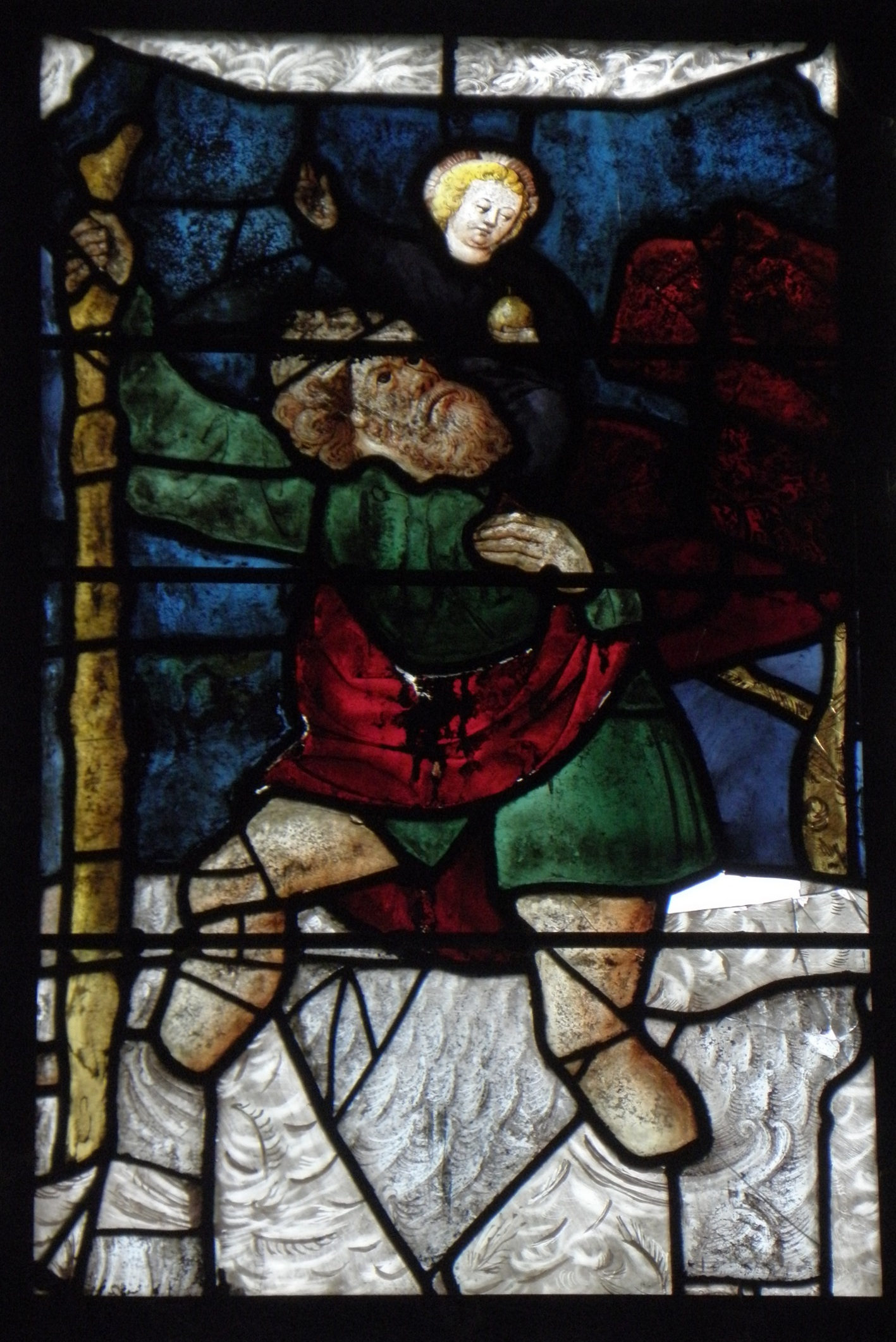 Localisation: Baie 8 de la chapelle Notre-Dame de Quelven, commune de Guern (56). Datation: 2d quart du XVIème siècle. Description: Saint-Christophe. Classement: par liste en 1840.